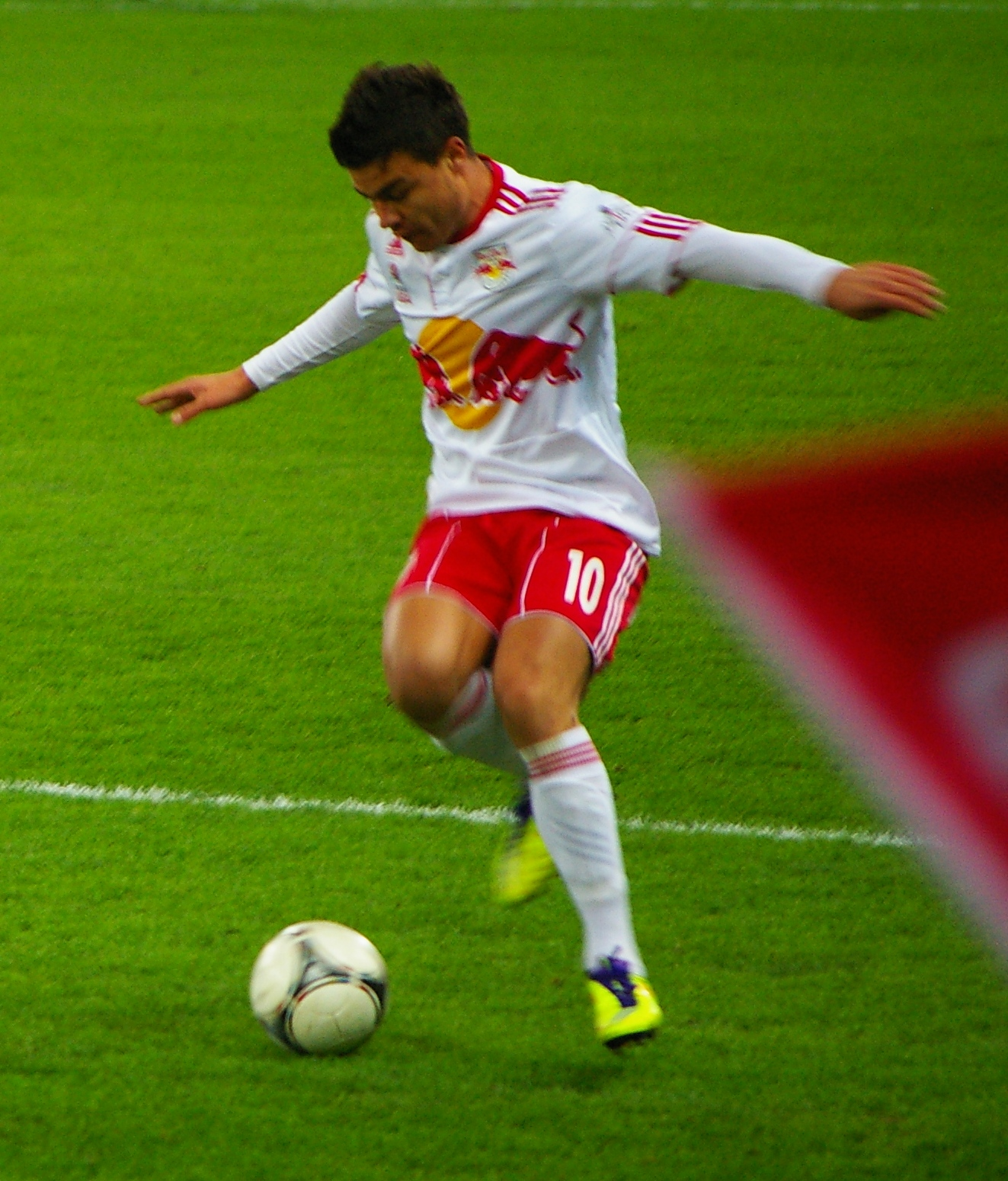 Stürmer Red Bull Salzburg